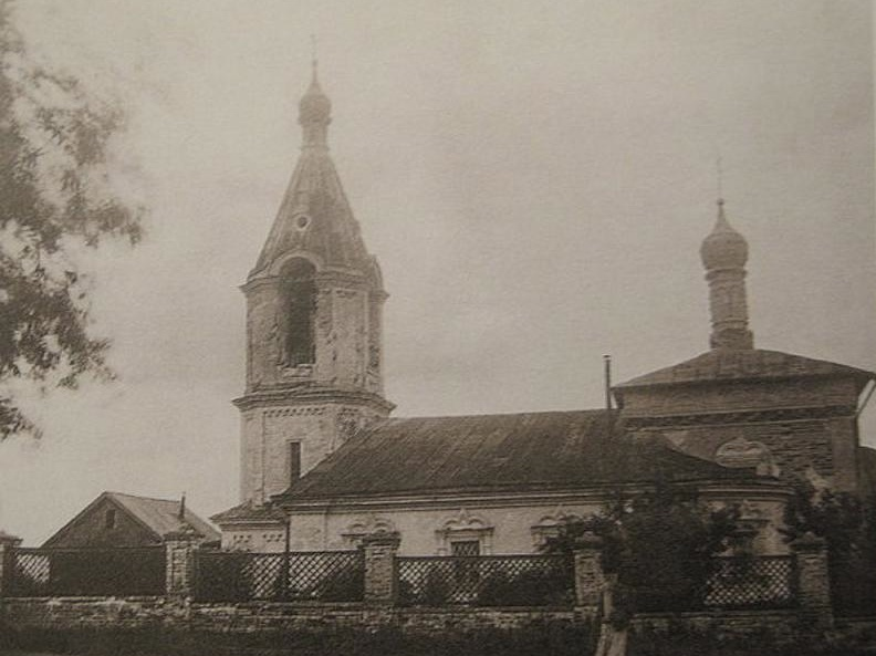 Храм святителя Николая в деревне Сабурово.